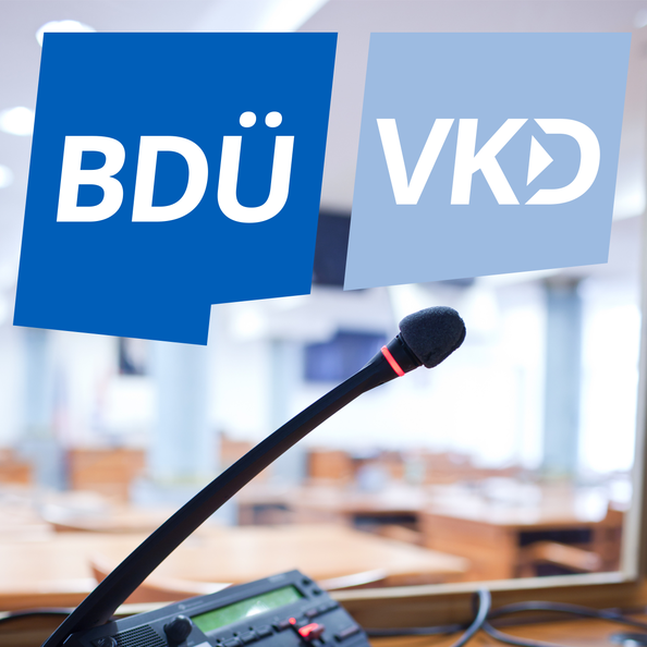 Logo des VKD